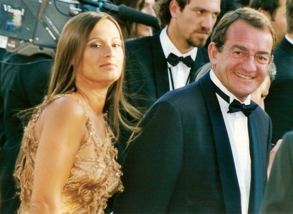 Nathalie Marquay et Jean-Pierre Pernaut au festival de Cannes